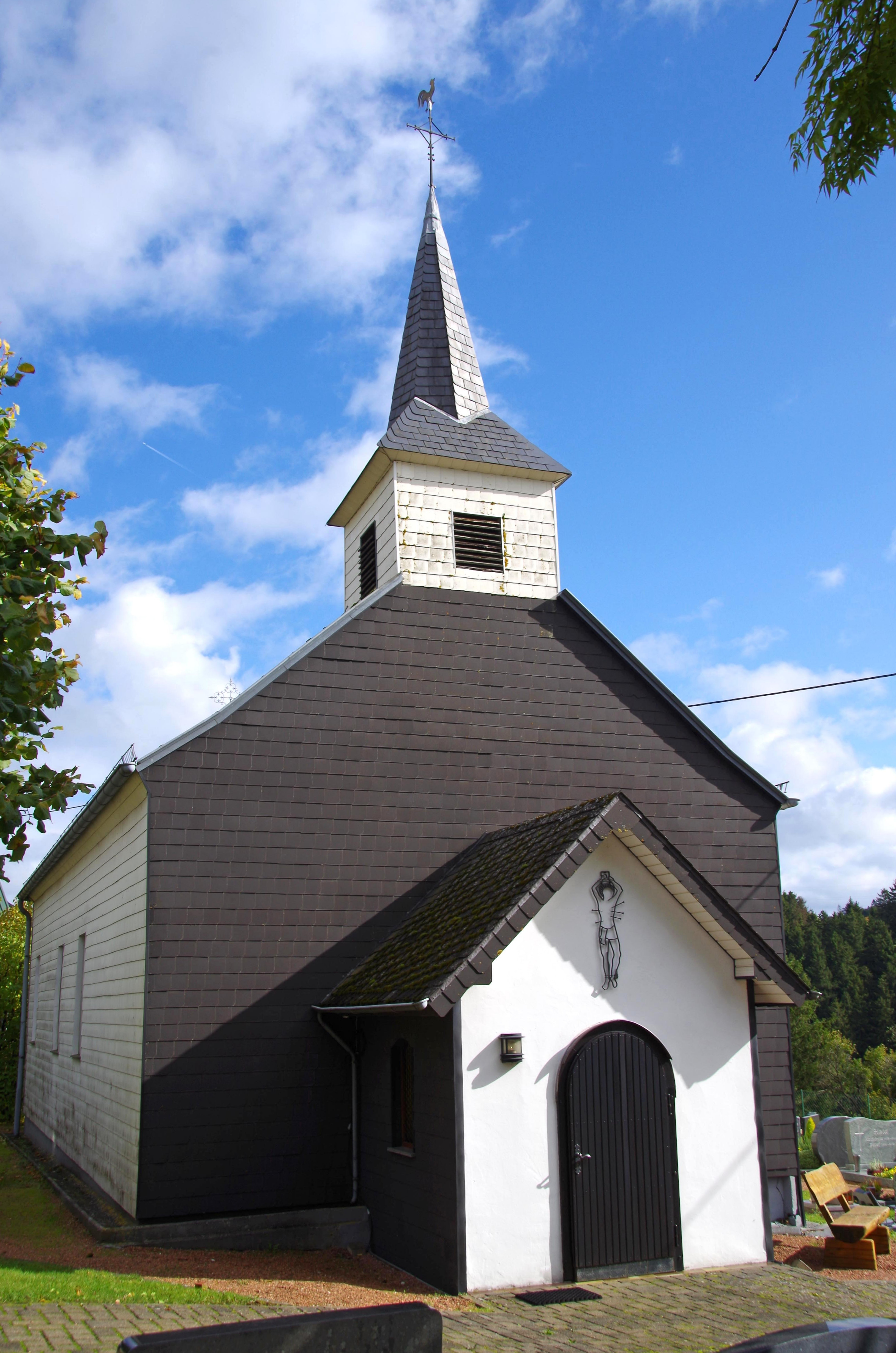 St. Sebastian Wollenberg, Außenansicht